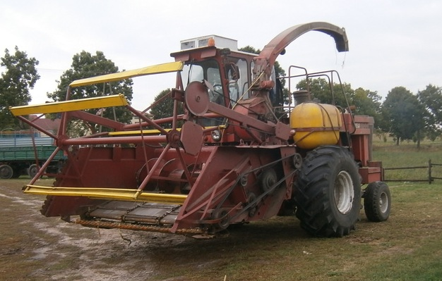 Sieczkarnia Z350/3 - widok ogólny